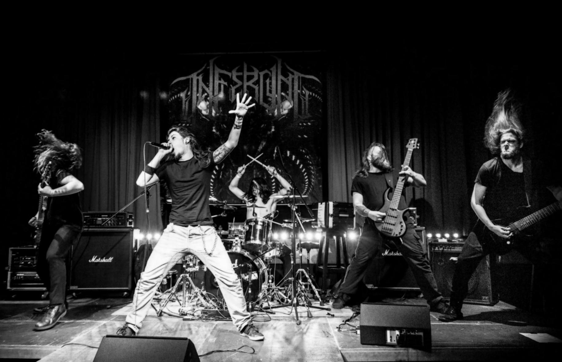 Nederlandse metalband Inferum, live in het Brabantse Best